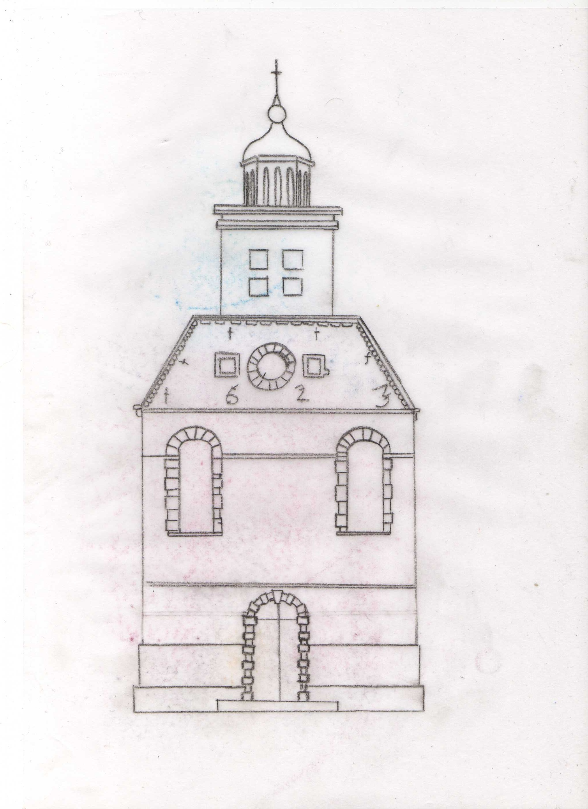 Dessin d'un aspect hypothétique de la façade primitive de la chapelle